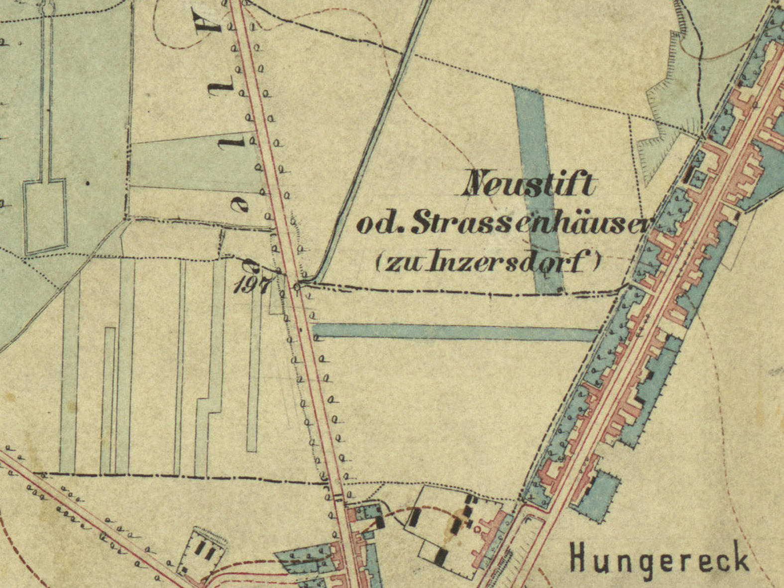 Neustift oder Straßenhäuser, Inzersdorf am Wienerberg. Kartenausschnitt aus: Gradkartenblatt Zone 13 Colonne XIV Section b4 (später 4756/2d). Franzisco-josephinische (3.) Landesaufnahme der österreichisch-ungarischen Monarchie. Aufnahmeblatt 1:12.500. Aufgenommen 1872